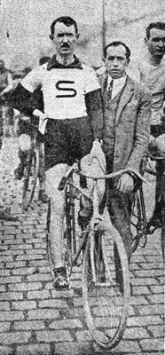 Rudolf Richter (1883-1962), český atlet-chodec, cyklista, sportovní organizátor a činovník.